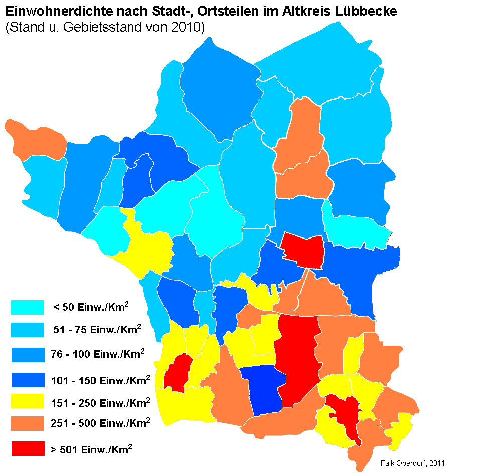 Bevölkerungsverteilung im Altkreis Lübbecke